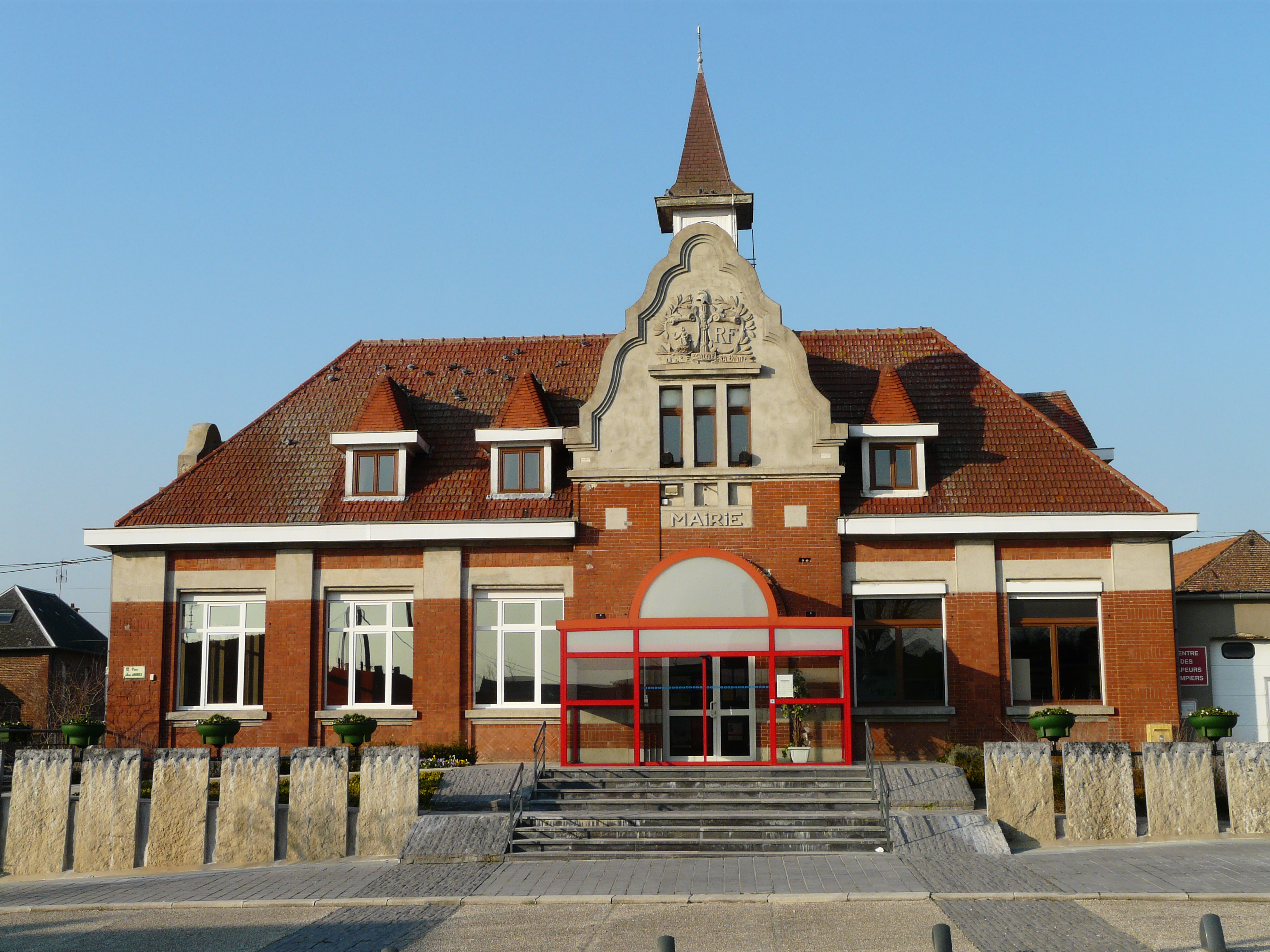 La mairie de Fontaine-Notre-Dame (Nord)